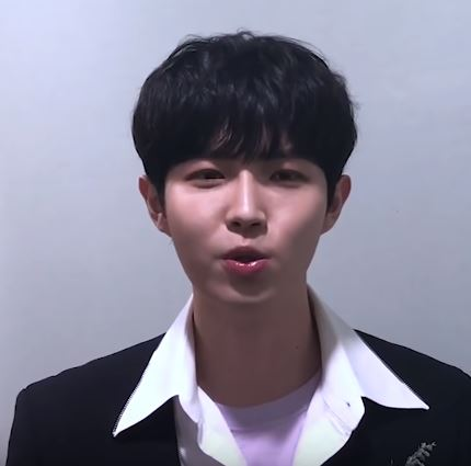 디스패치 인스타그램 팔로워가 300만을 돌파했답니다. 많은 스타들이 축하해 줬는데요. 축하영상을 모아봤습니다.